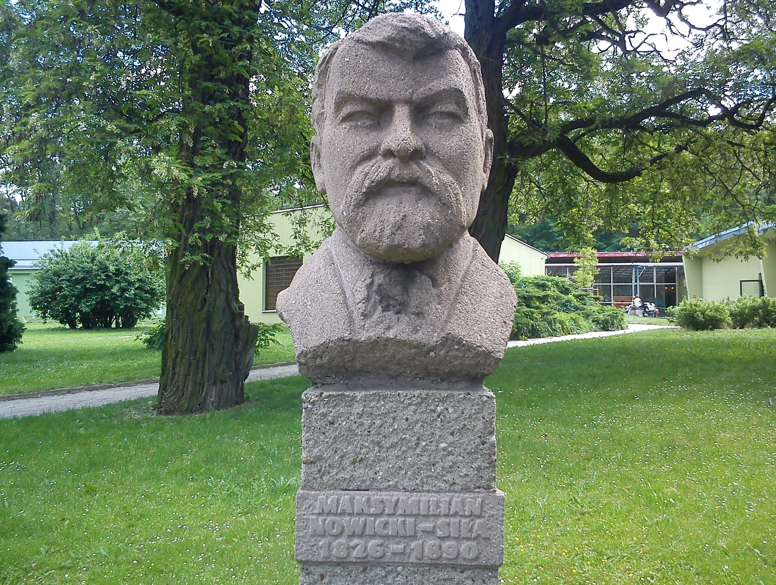 Szreniawa - pomnik Maksymiliana Siły-Nowickiego w parku pałacowym przy Muzeum Rolnictwa (zabytek nr 1804/A).